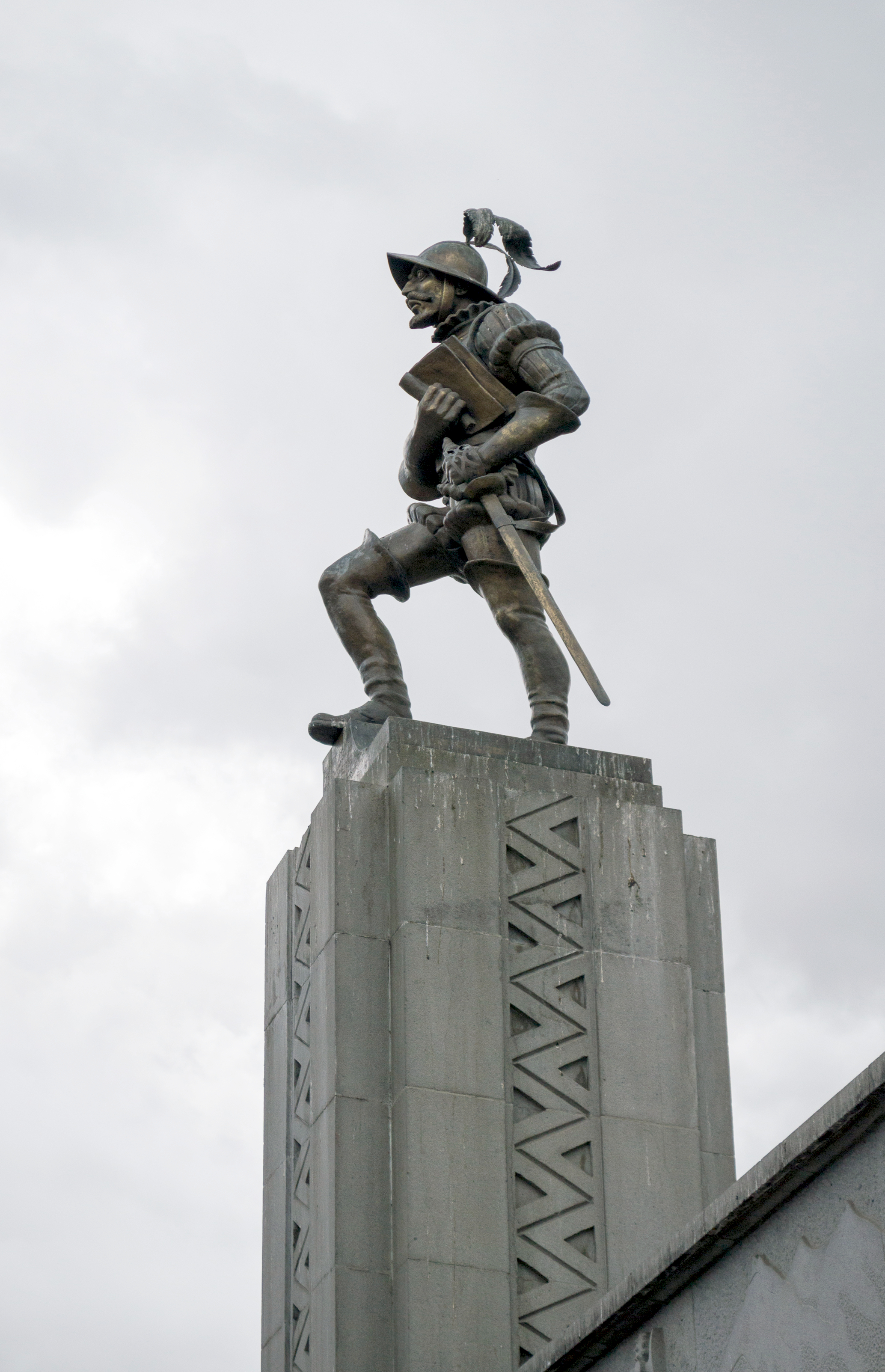 Alonso de Mendoza Plaza Alonzo de Mendoza, La Paz - Bolivia This medium shows the protected monument with the number L/00-200 in Bolivia.